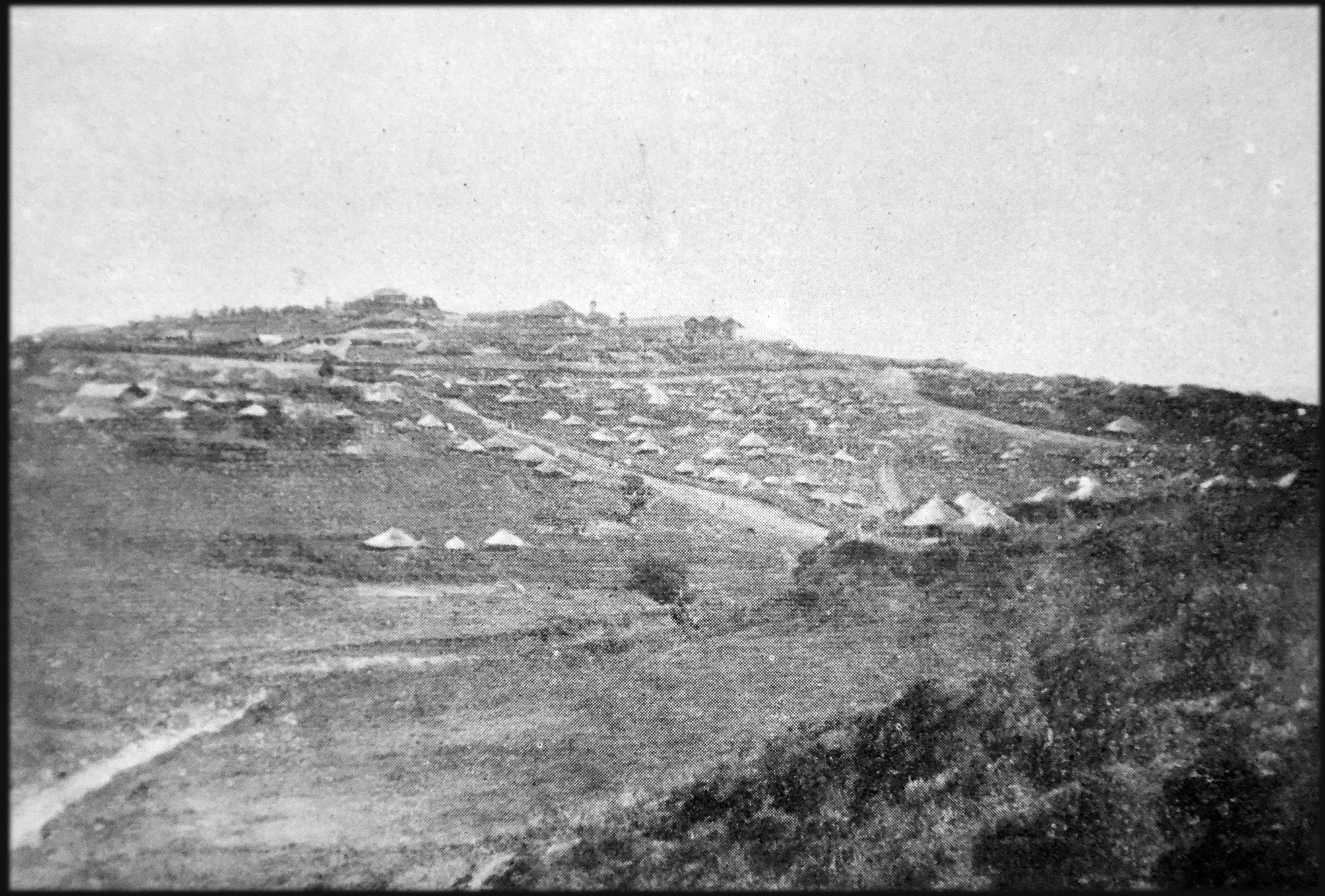 Palais de Ménélik (empereur d'Ethiopie) à Addis-Ababa. Photo ancienne, illustrant un article sur l'Abyssinie dans la revue française "Revue illustrée" (Tome relié 1902)